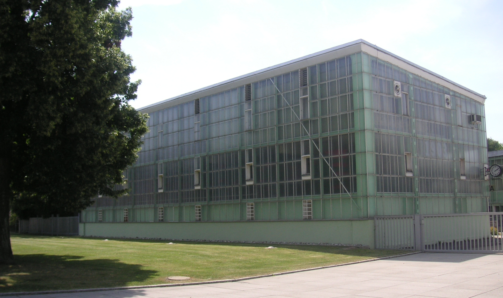 Denkmalgeschützte Fabrikhalle der Firma Steiff